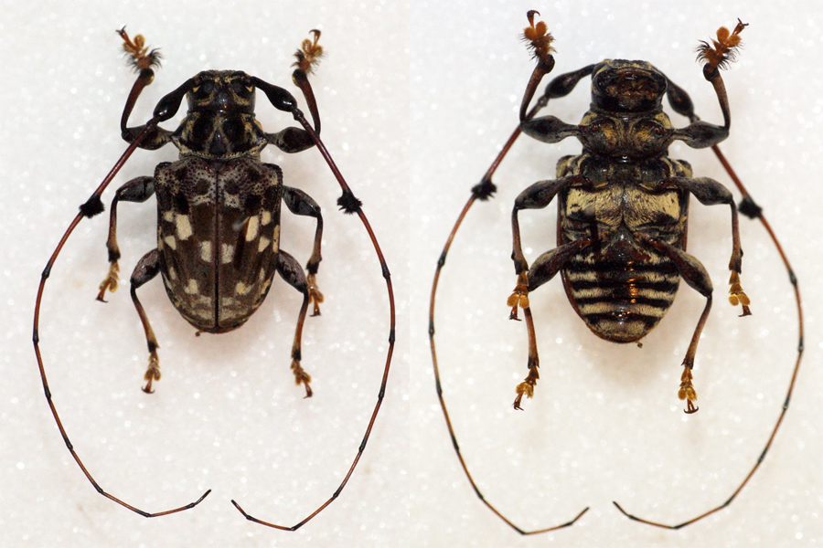 Guérin-Méneville,1855 Sex: Male Data: 21-08-12 - Juanjui - Peru Size: ?